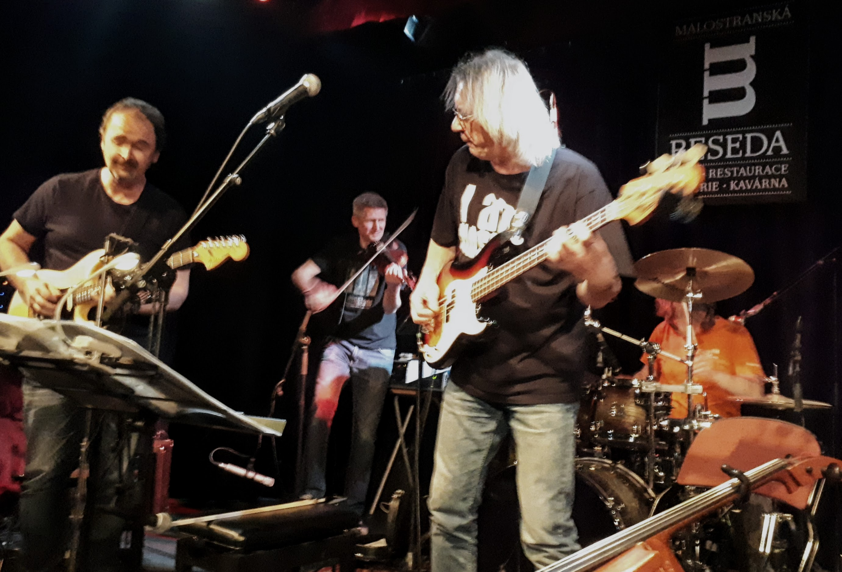 Skupina Kybabu v Malostranské besedě